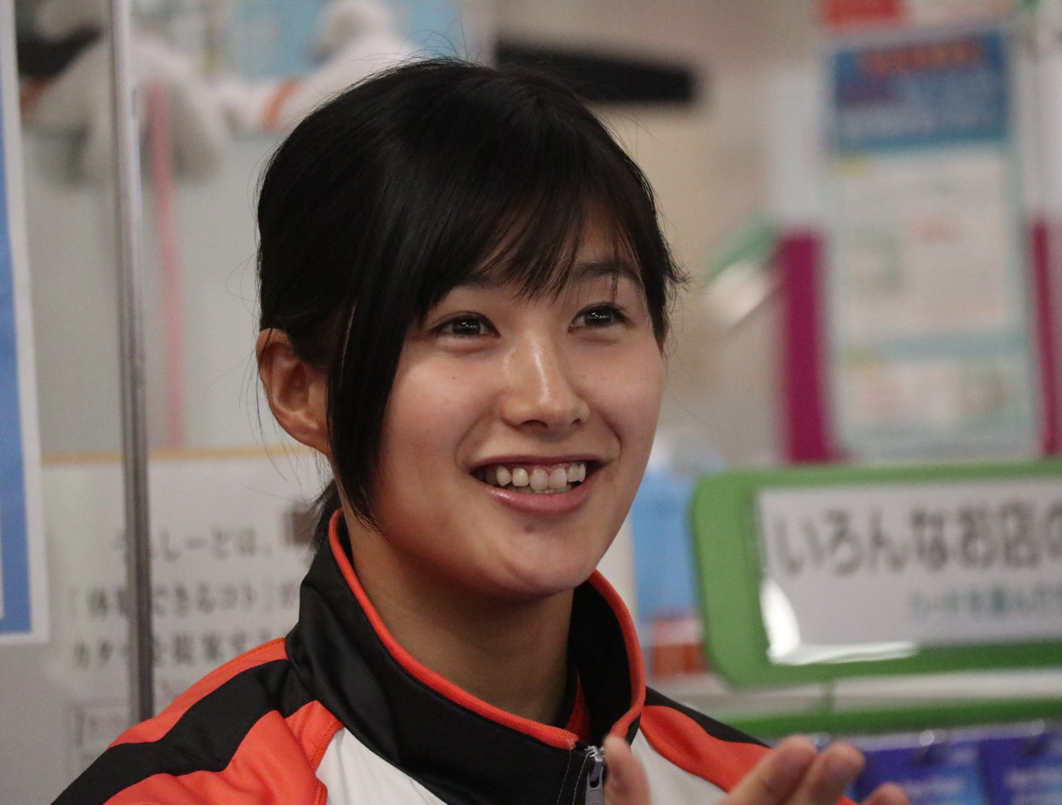 女子プロ野球選手